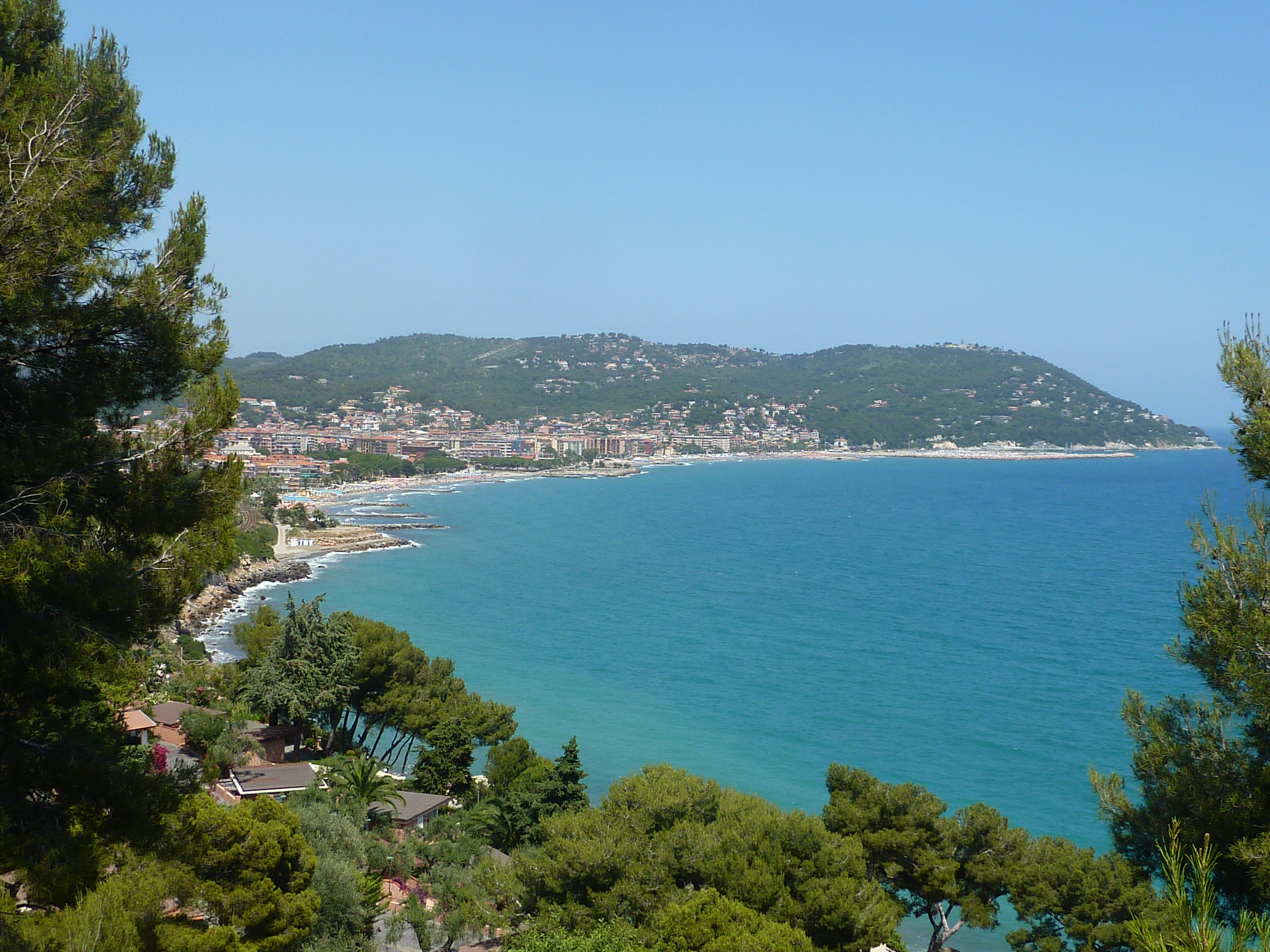 Andora da Conca verde